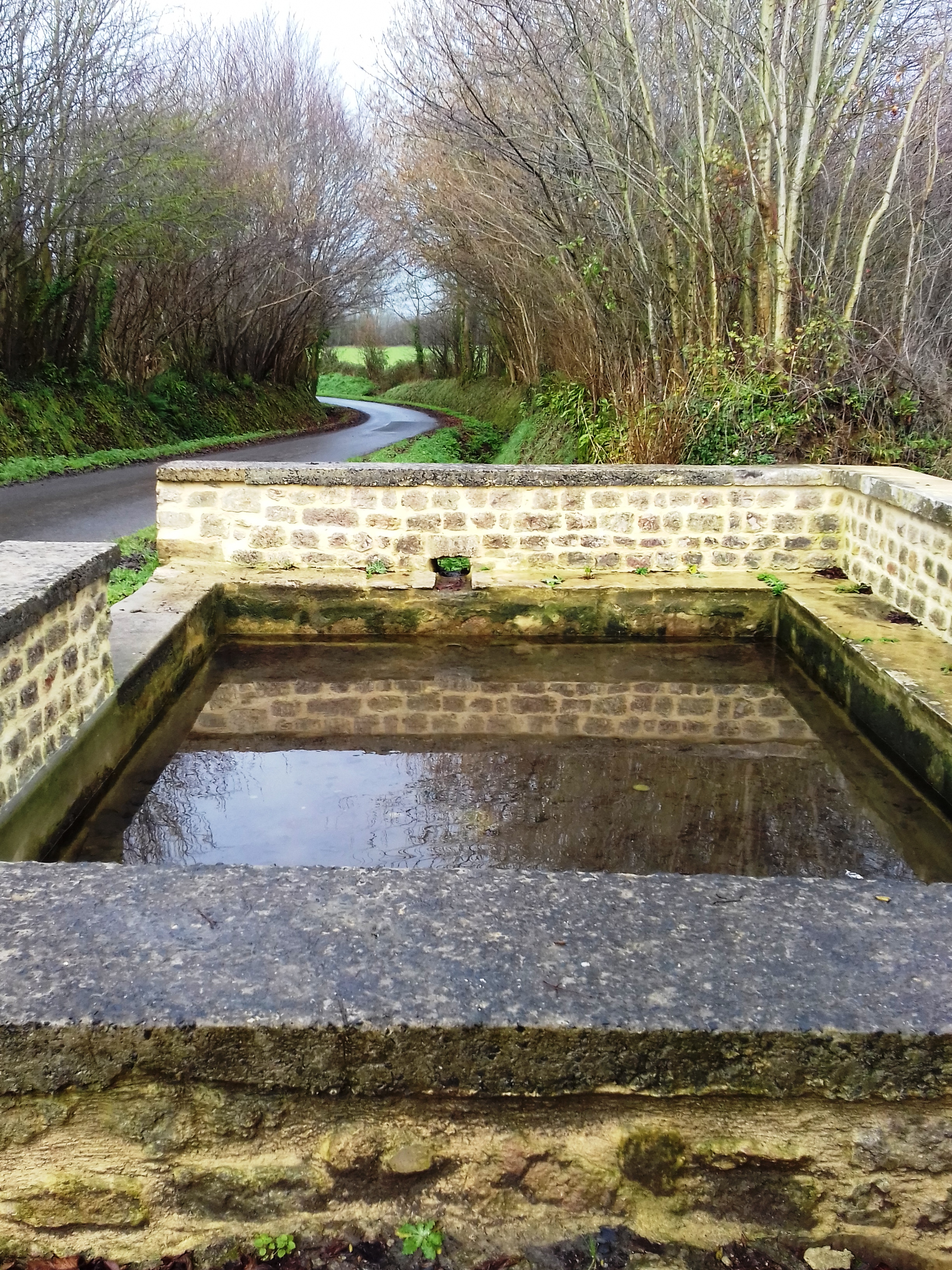 Neuilly-la-forêt Lavoir de Clerbosq